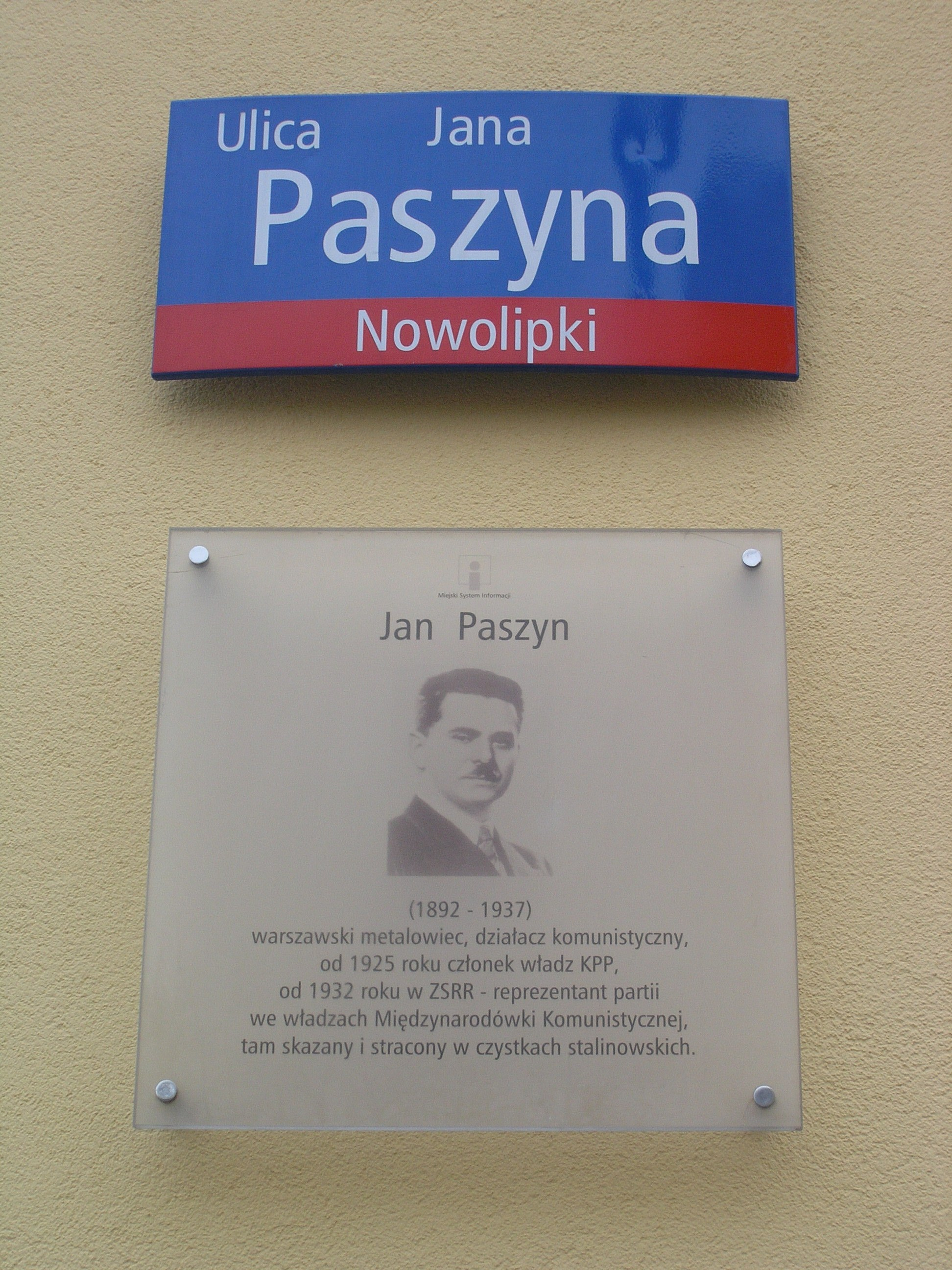 Tablica z nazwą ulicy Jana Paszyna oraz tablica Miejskiego Systemu Informacji z informacją o patronie.